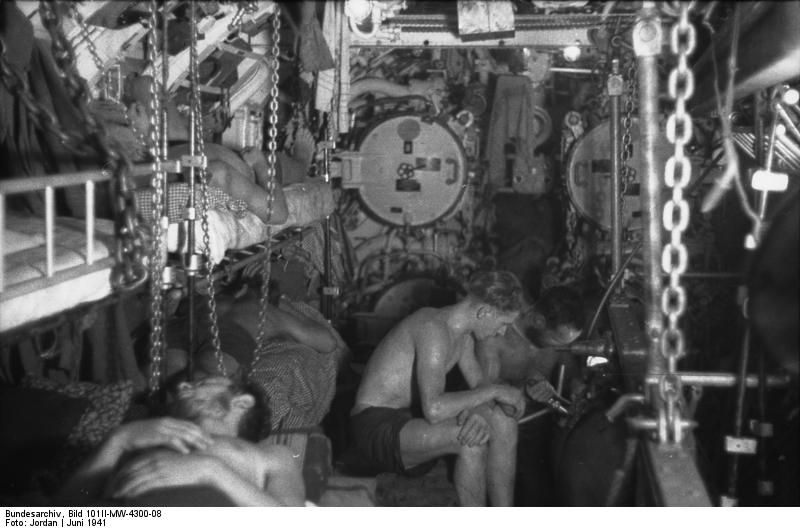 Findbuch:Positiv: U-107 , , Juni 1941 (Bugraum)